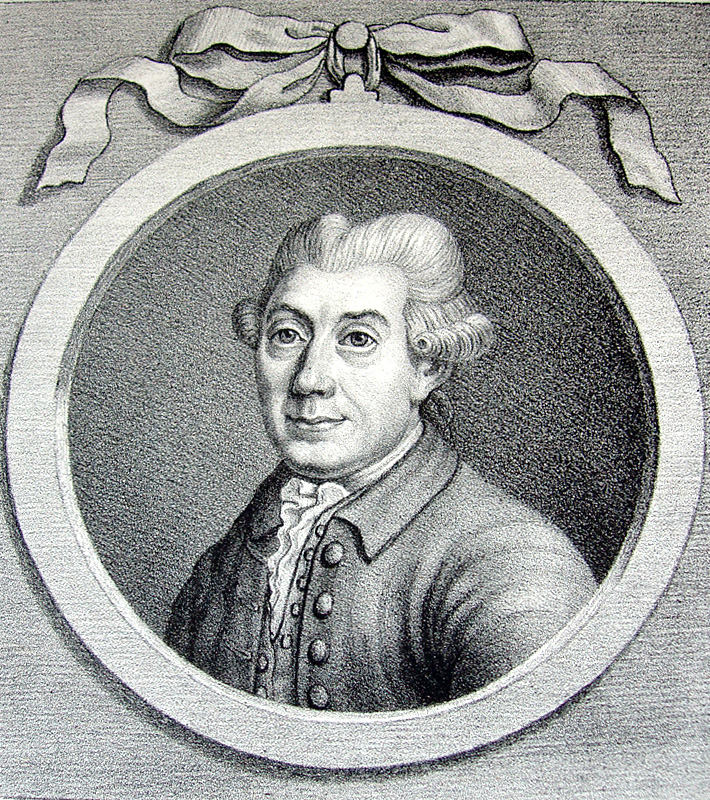 Carsten Niebuhr 17. marts 1733 - 26. april 1815, tysk/dansk opdagelsesrejsende Nach einem Kupferstich von C.C. Glassbach, nach 1770.